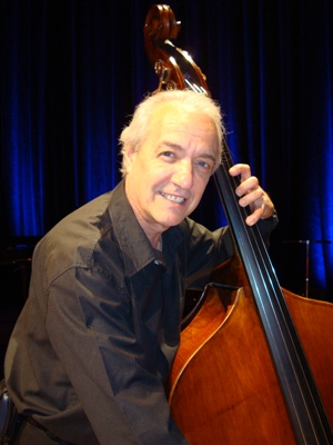 Músico oriundo de Lanús. Integró la Orquesta Estable del Teatro Colón destacándose en la orquesta de Leopoldo Federico.